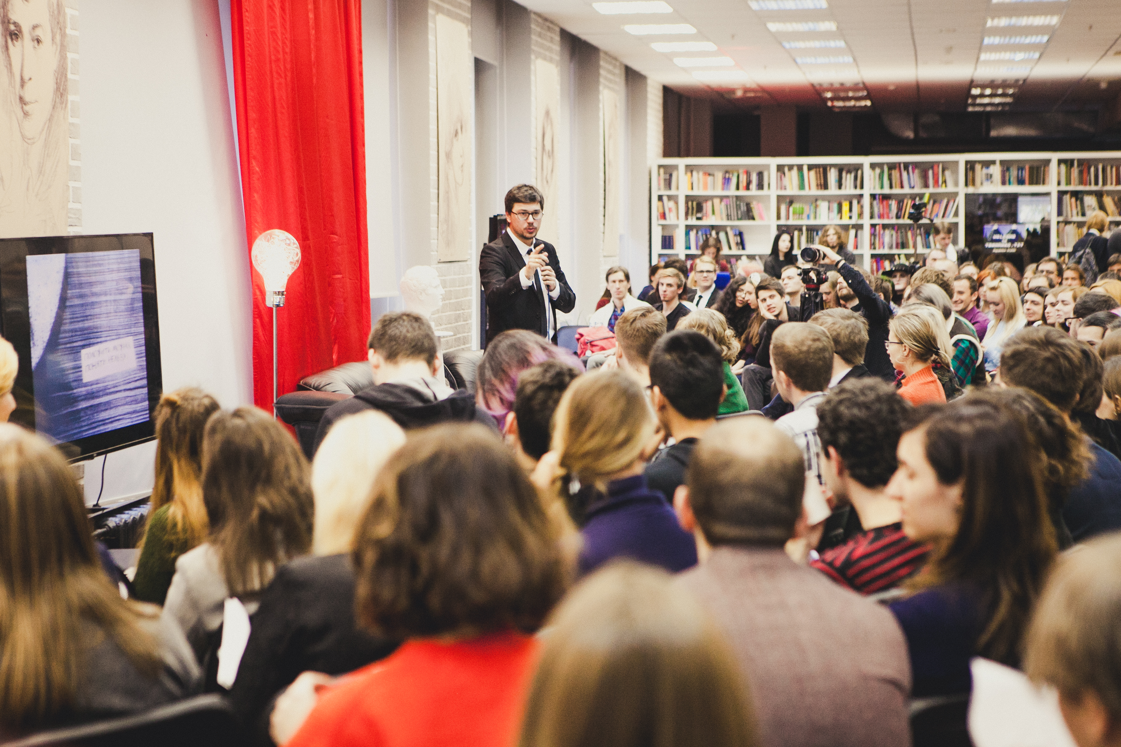 Фестиваль ТвинПикс.txt в библиотеке им. Н.А.Некрасова